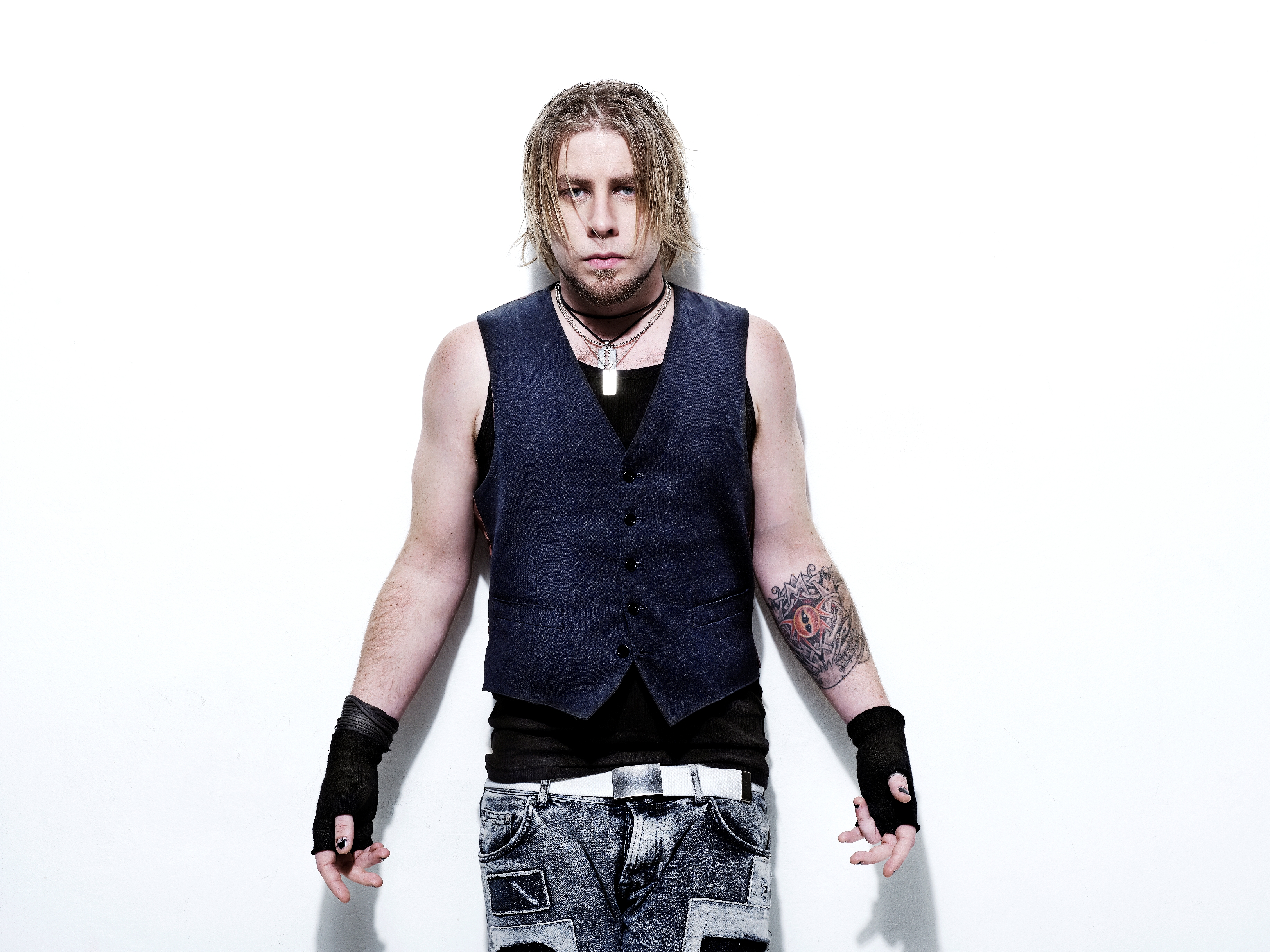 Idolvinnaren Jay Smiths album har redan sålt platina, en knapp vecka efter albumsläpp. Albumet innehåller Jays 11 största stunder från årets Idol samt vinnarlåten ”Dreaming People”, skriven av Svante Halldin, Jakob Hazell, Sharon Vaughn och Christian Walz. Efter jul är det dags för Jay och kompisarna från idol att repetera inför arenaturnén Idol Live! Turné som drar igång i januari.